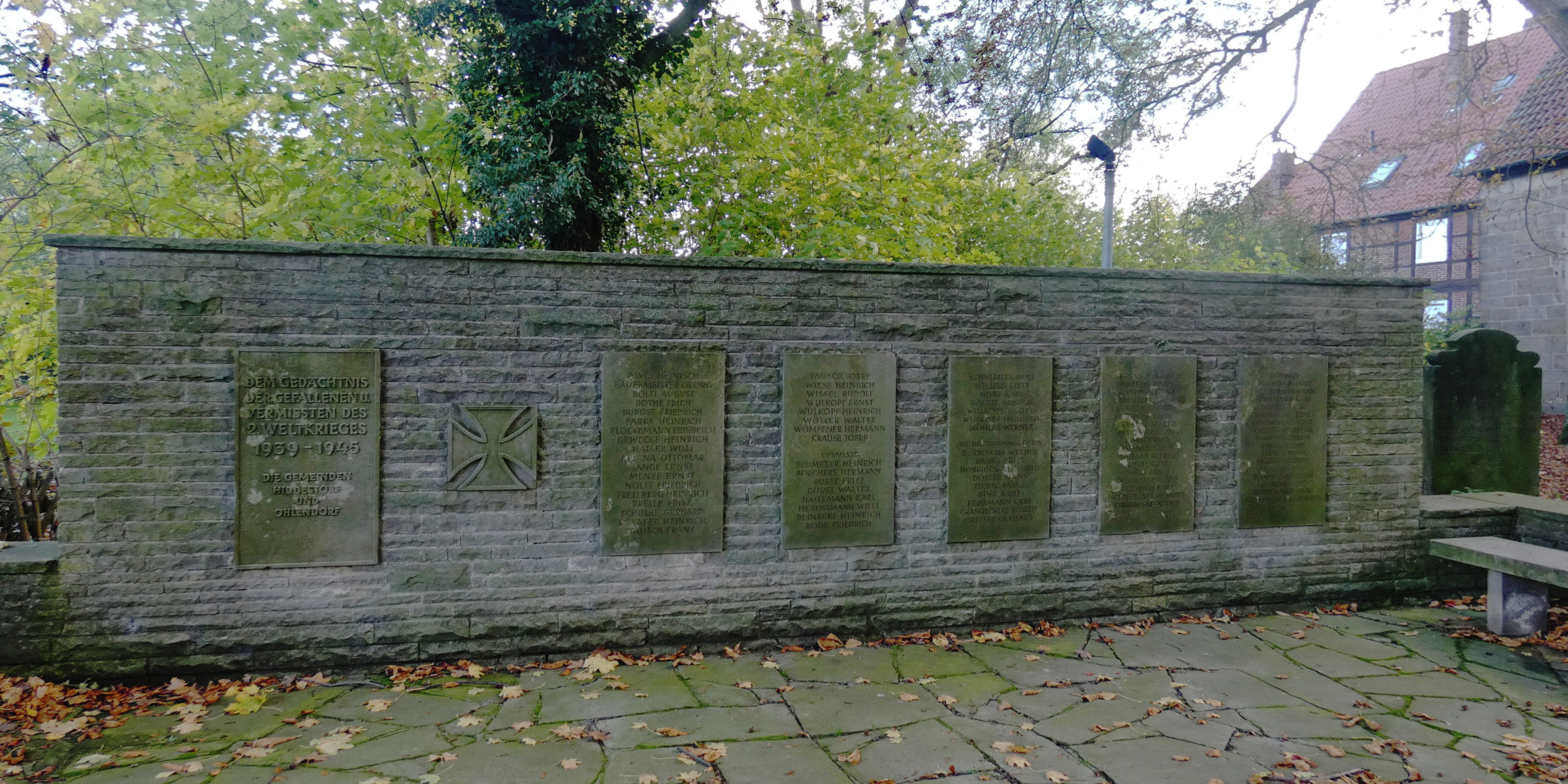 Das Gefallenen-Ehrenmal in Hiddestorf, einem Stadtteil von Hemmingen in der Region Hannover in Niedersachsen wurde zu Ehren der im Ersten und der im Zweiten Weltkrieg Gefallenen aus Hiddestorf und aus dem Nachbarort Ohlendorf errichtet.